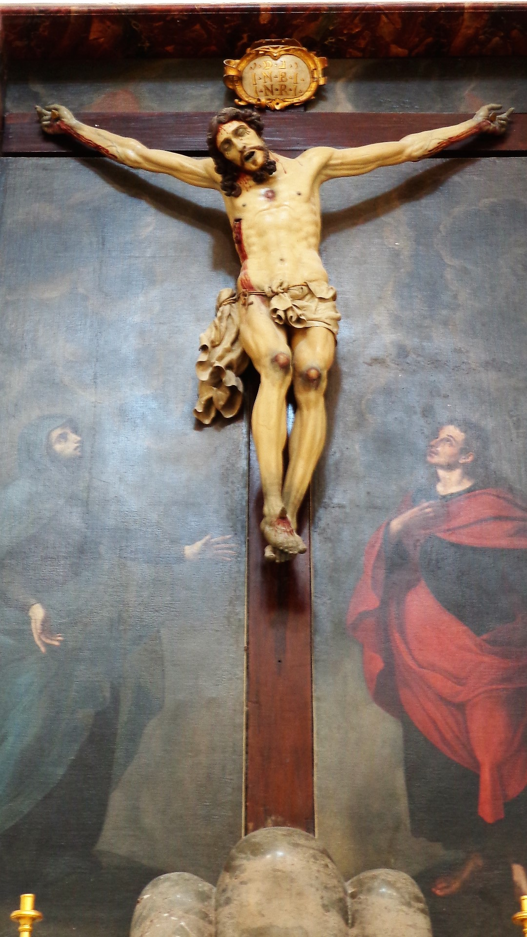 Scultura di Virtù Morale di Cristoforo Milanti